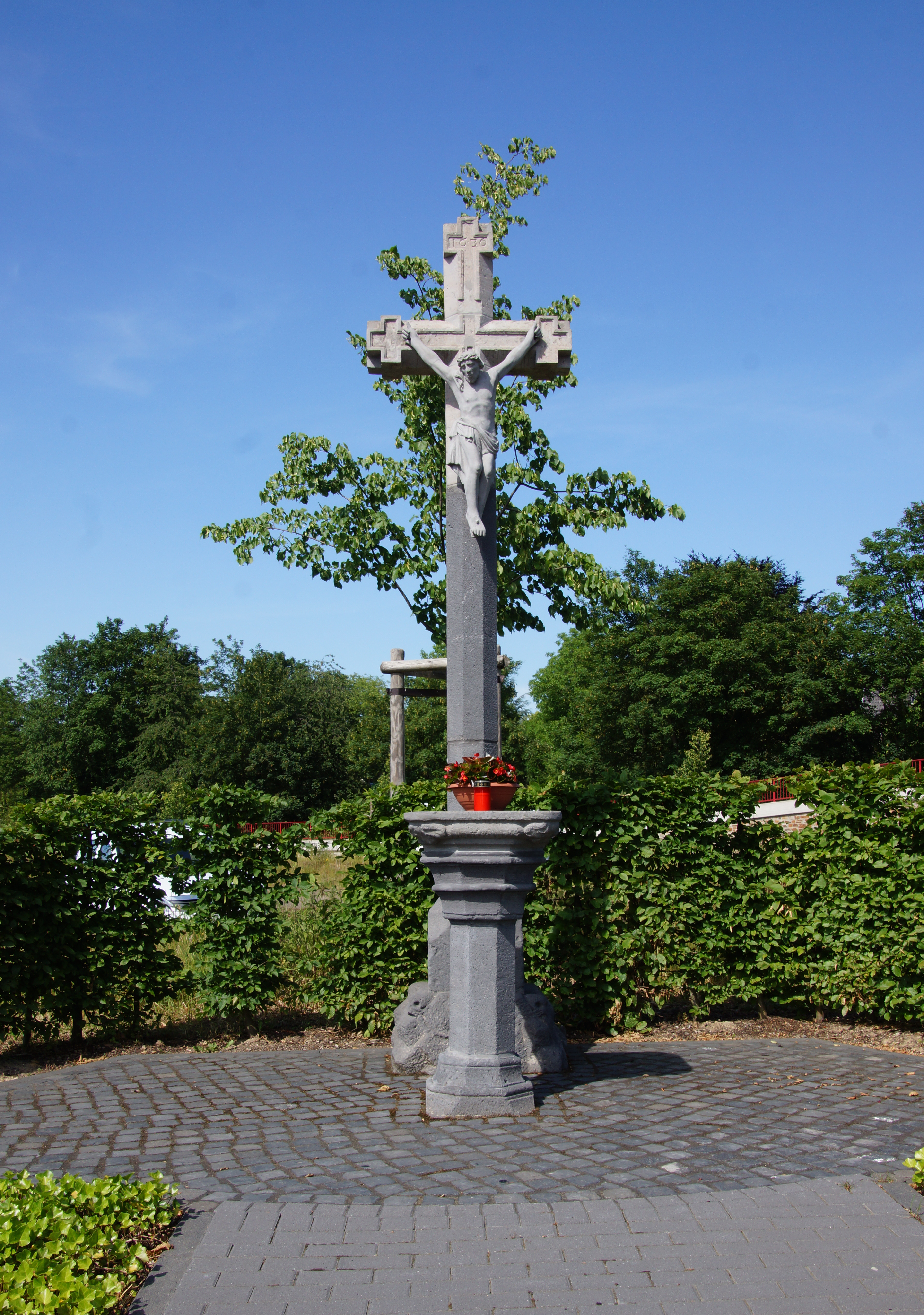 Wegekreuz Schröter Kreuz (Scheurener Kreuz) in Unkel, Scheurener Straße/ Am Schröter Kreuz